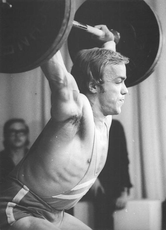 Peter Wenzel ADN-ZB Demme 05.07.1975 Mühlhausen: DDR-Meisterschaften der Senioren im Gewichtheben-Mit 190 kg im Stoßen stelte Peter Wenzel vom SC Einheit Dresden am 04.07.1975 im Mittelgewicht den Weltrekord ein und erzielte im Reißen mit 150 kg einen neuen DDR-Rekord.